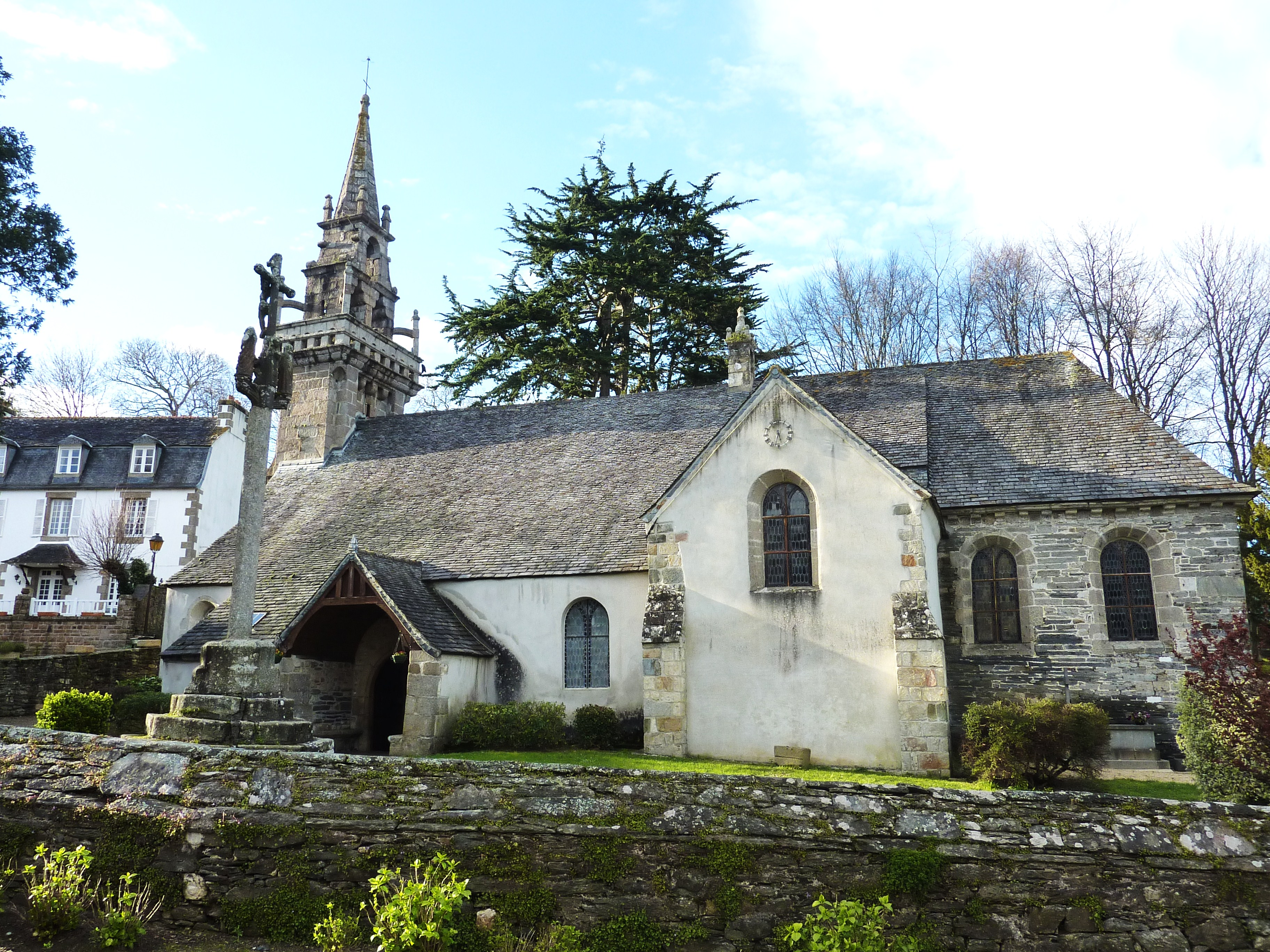 Locquénolé : l'église paroissiale Saint-Guénolé et le calvaire